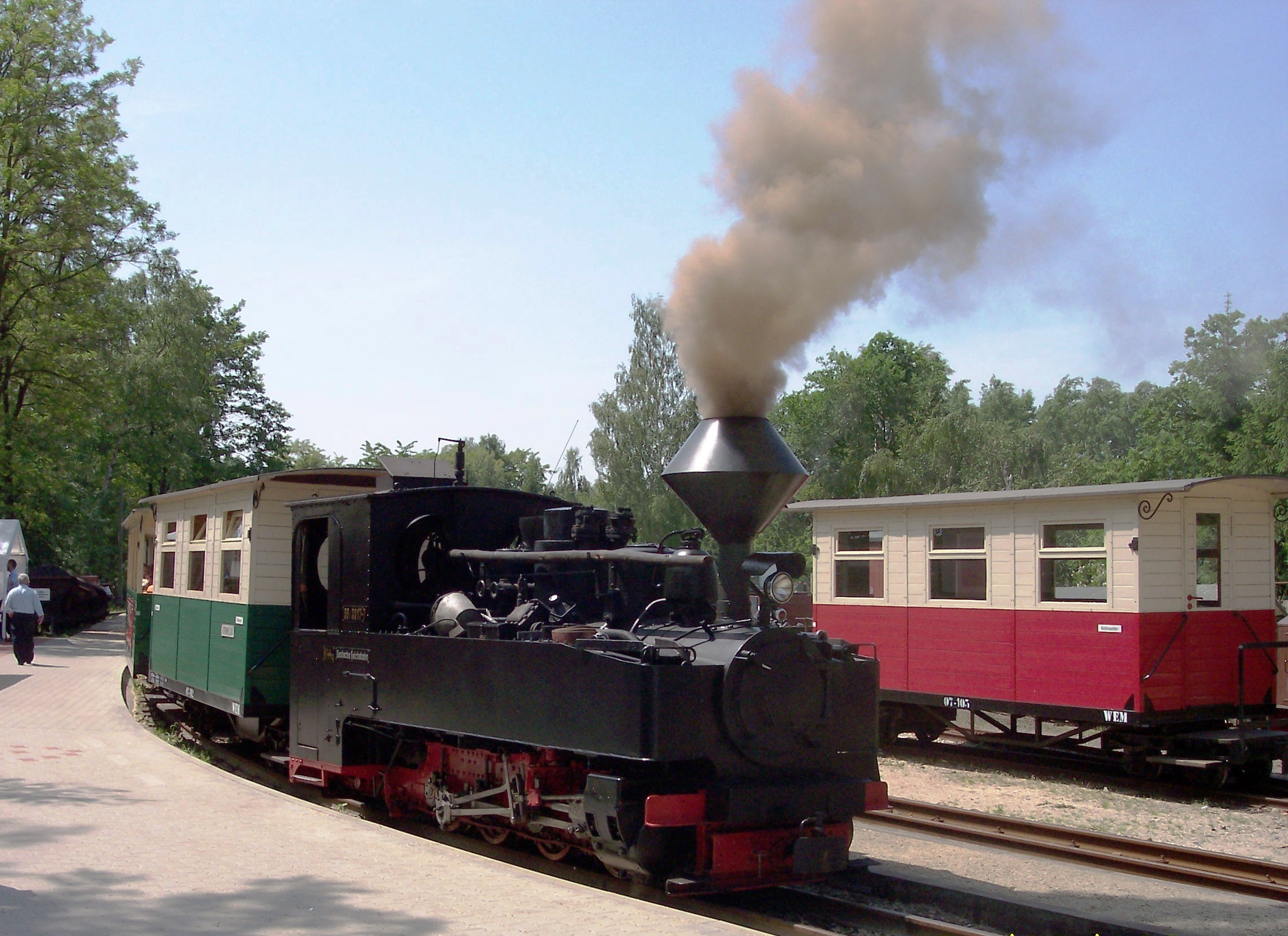 Waldeisenbahn Muskau: Die Lok 99 3317 stand von 1979 bis 1990 an der Muskauer Straße in Weißwasser als technisches Denkmal.Weblink: Geschichte der Lok